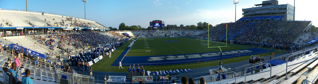 Johnny Floyd Stadium Minnesota Golden Gophers vs MTSU Blue Raiders